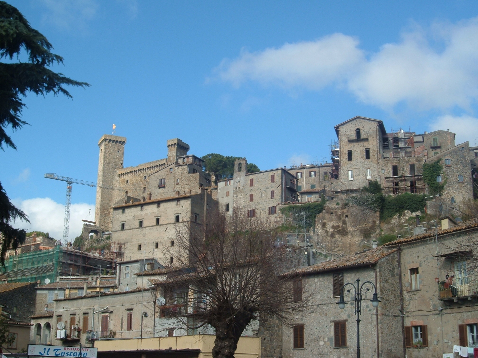 טירת בולסנה